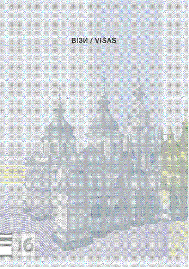 Зразок бланка паспорта громадянина України (стор. 16). Зображення Софії Київської